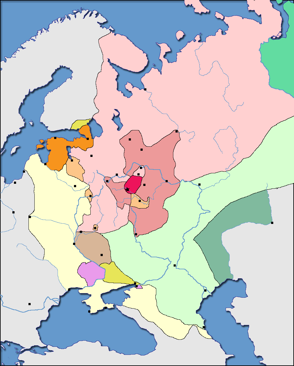 Carte de l'expansion de la Russie entre 1300 et 1796. Cette carte est inspirée de la carte chargée sur Commons Muscovy-Russia 1300-1796.jpg BLANK MAP (voir Image:Russie 1300 1796.png pour une carte avec légende)